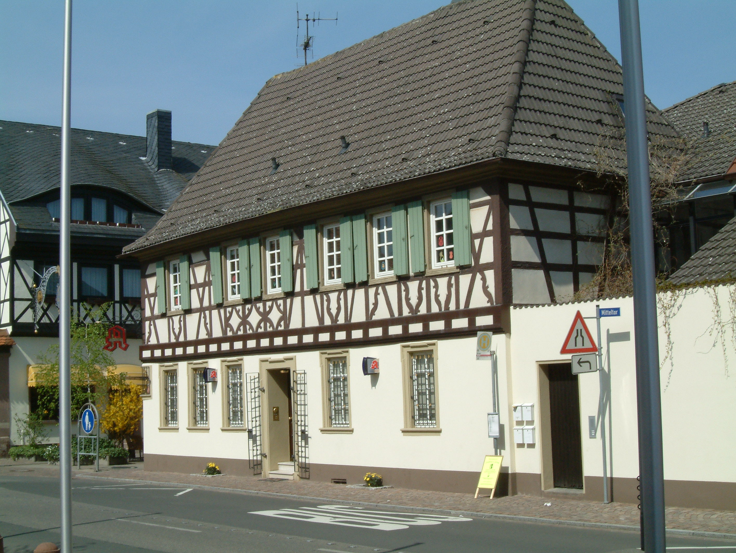 St.-Michael-Apotheke zu Dirmstein, selbst fotografiert am 24.04.2006 und freigegeben durch Benutzer:Mundartpoet